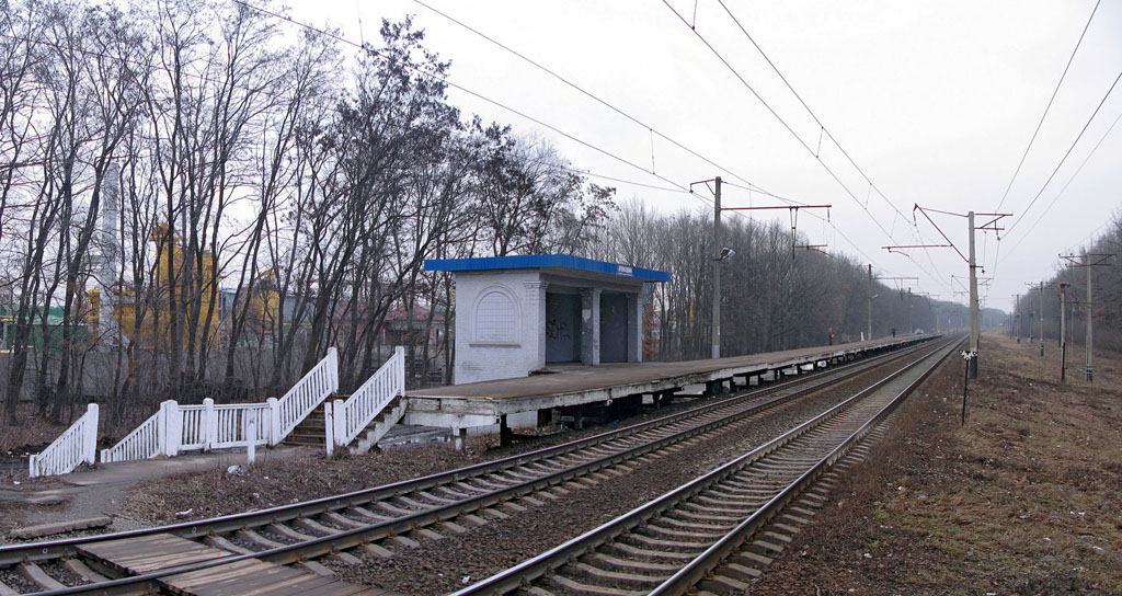 Платформа непарного напрямку